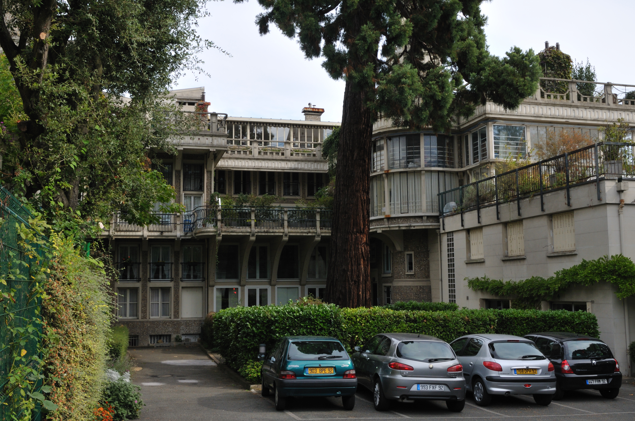 Maison de François Hennebique à Bourg-la-Reine, Hauts-de-Seine, France